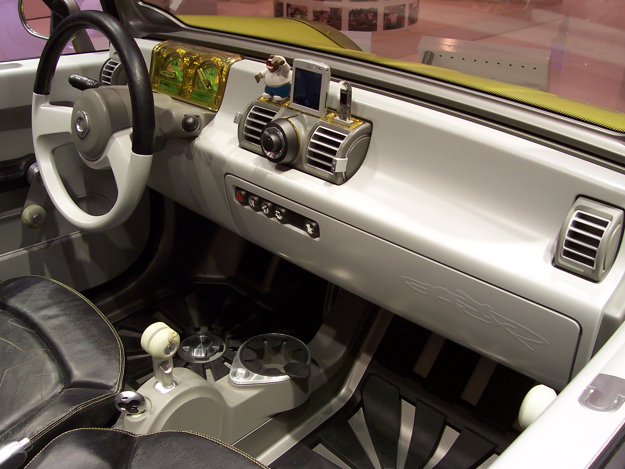 Smart (automobile) - crosstown hybrid (Concept vehicles) Hier: Innenraum von der Beifahrerseite aus